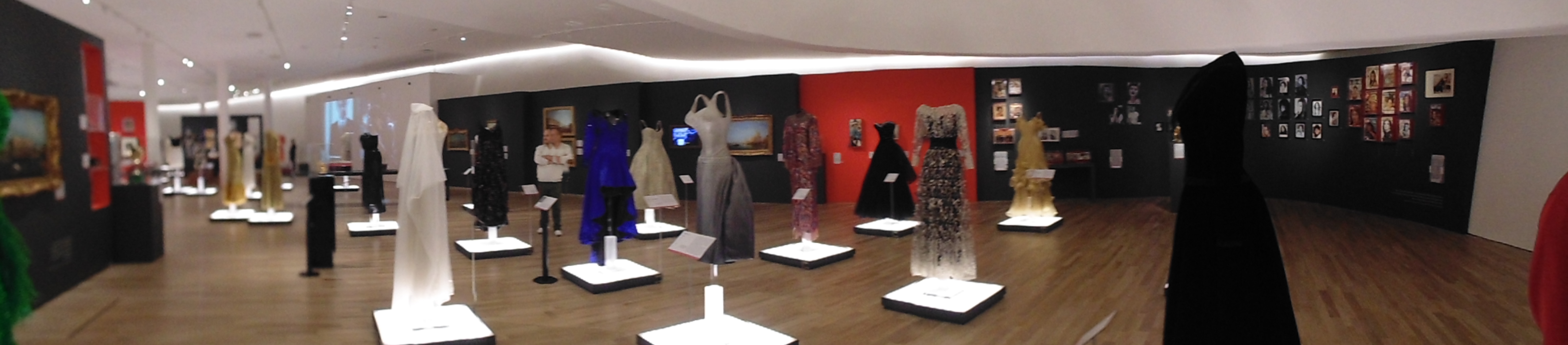 Exposición de vestuario de Sophia Loren — Museo Soumaya Plaza Carso, Mexico, D.F.